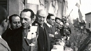 Amadeo Sabattini asumiendo como gobernador de Córdoba, 1936.